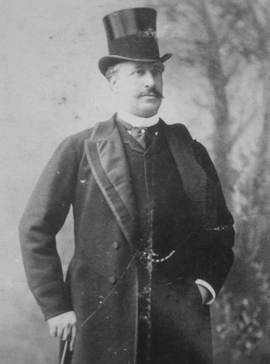 Comte Adhémar d'Oultremont de Duras, à La Berlière (1845-1910), époux de la princesse Clémentine de Croÿ.